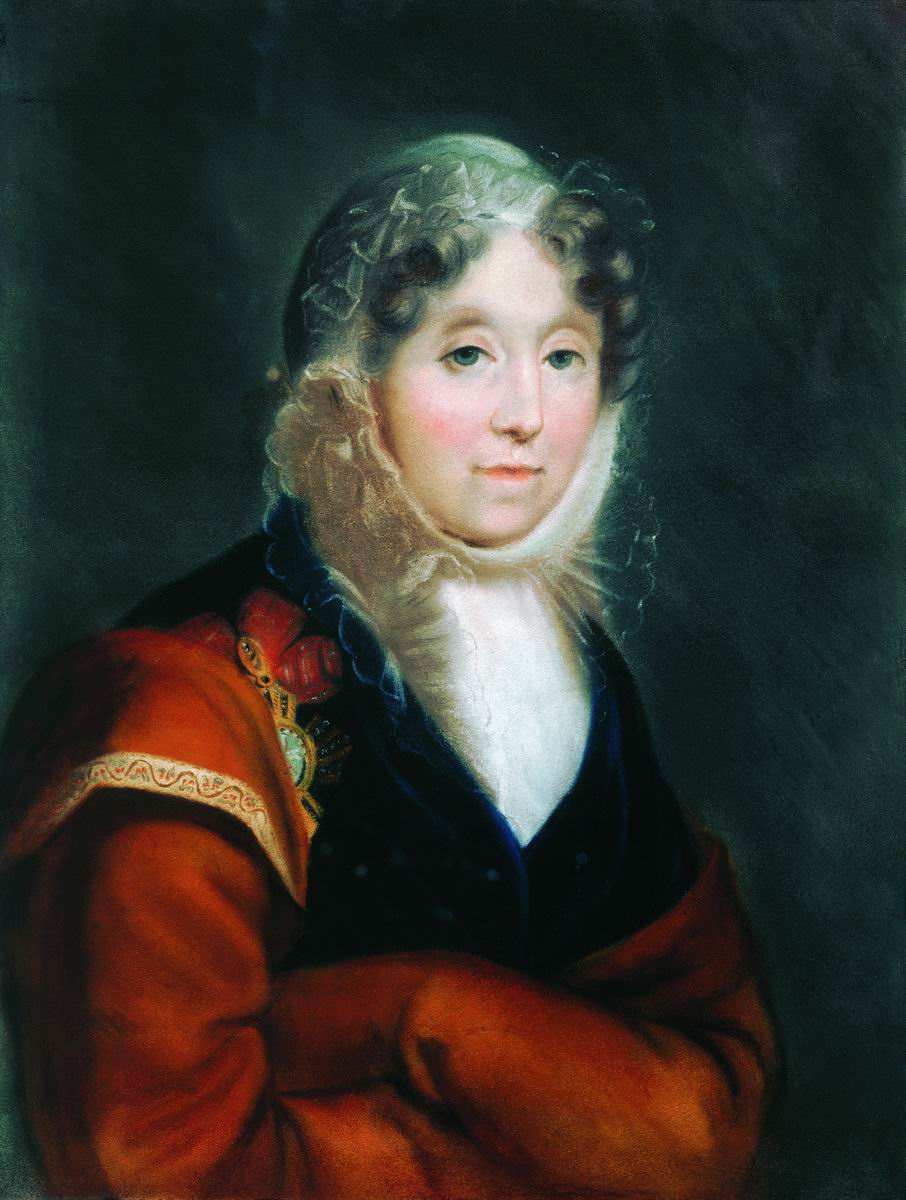 Княгиня Екатерина Александровна Долгорукова, ур. графиня Бутурлина (1750—1811)